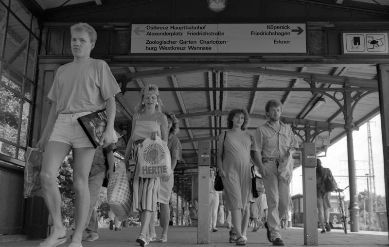 22.7.1991 Berlin-Karlshorst, S-Bahnhof-Treppe